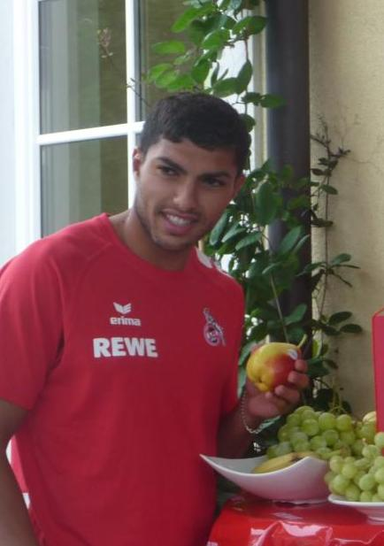 Adil Chihi bei einem REWE Werbetermin